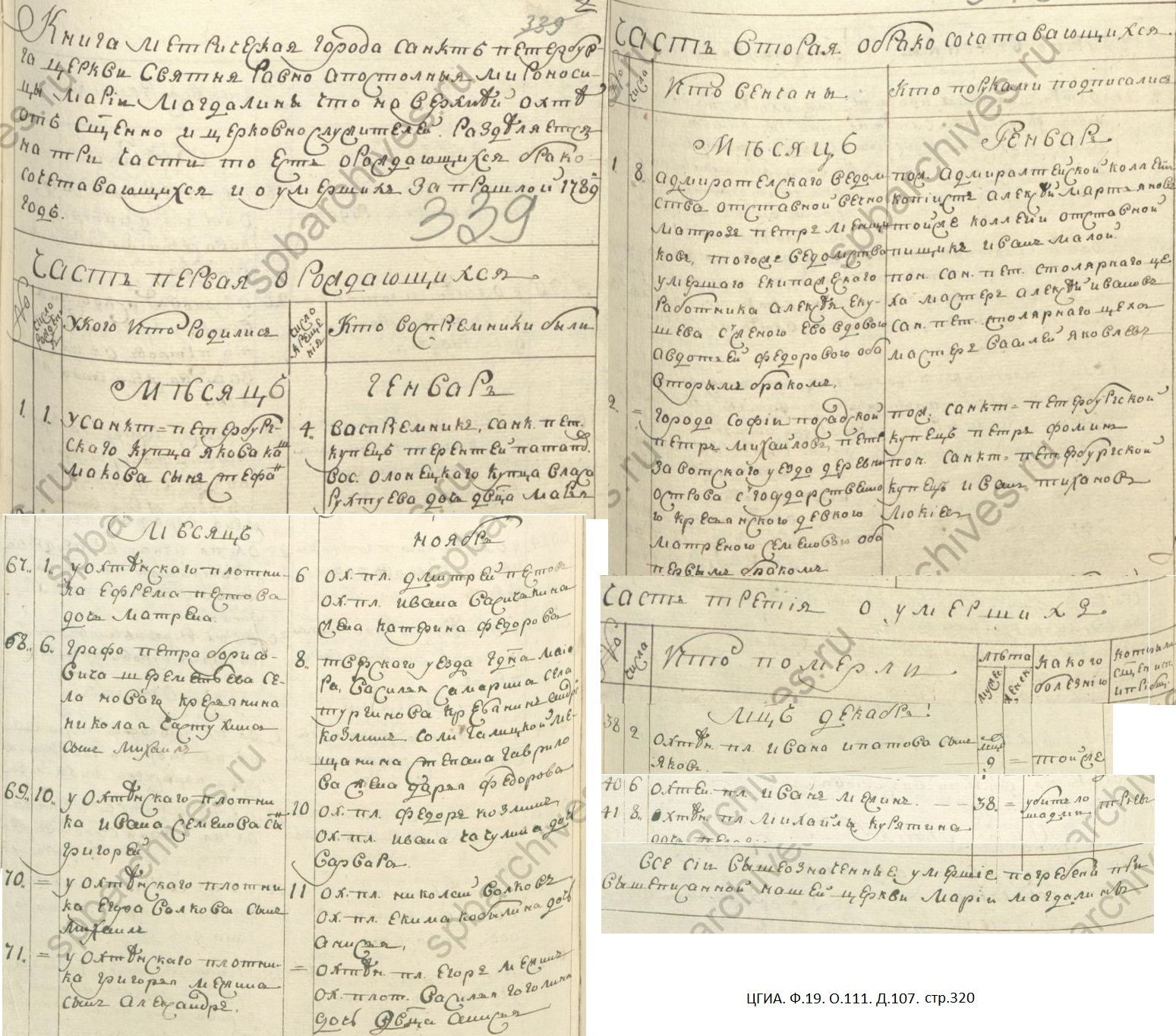 Копия фрагментов Метрической книги